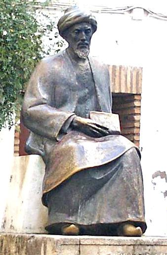 Estatua de Maimónides en la plaza de Tiberiades, Córdoba (España)